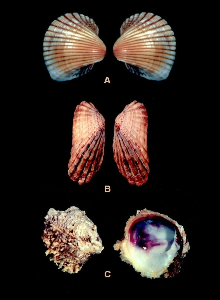 Fotos de Moluscos del estado Falcón - Venezuela A. Anadara ovalis B. Carditamera gracilis C. Chama macerophylla